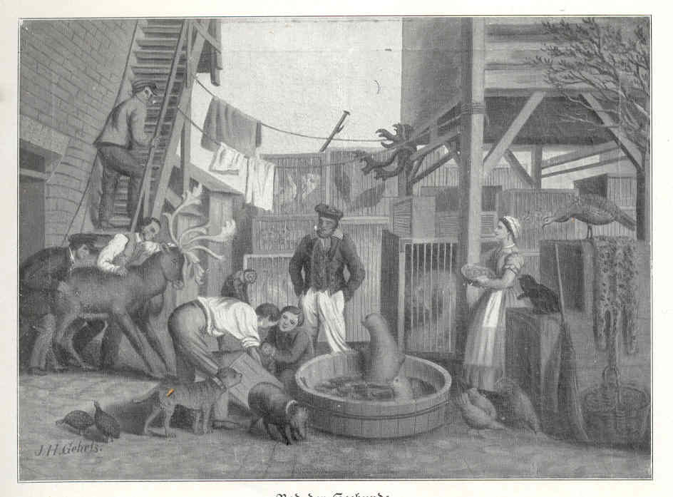 Bad der Seehunde. (Handelsmenagerie des Gottfried Claes Carl Hagenbeck, St. Pauli) Holzstich